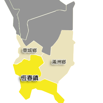 屏東縣恆春鎮相對位置。